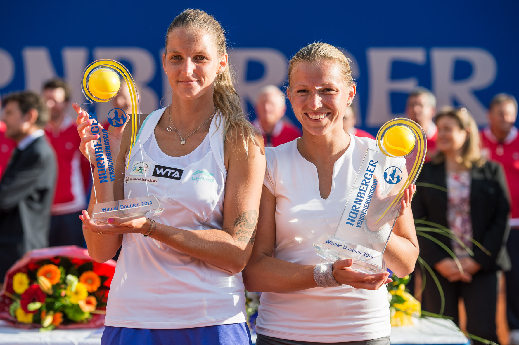 Damentennis,Karolina Pliskova,Karolína Plíšková,Michaella Krajicek,Michaëlla Krajicek,Nürnberger Versicherungscup 2014,Siegerehrung,Tennis,WTA